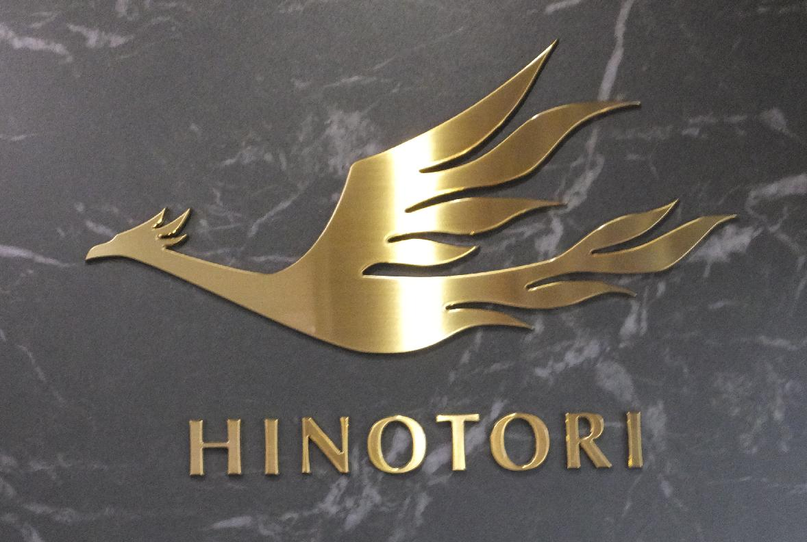 近鉄80000系電車のエンブレム。80201車内ベンチスペース脇に掲示されたもの。